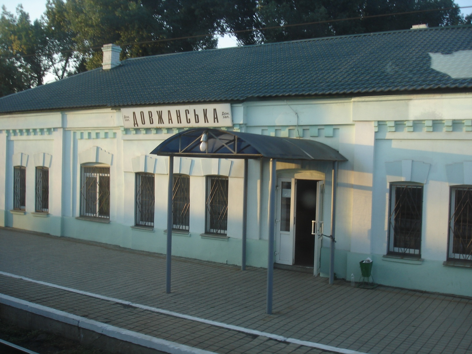 ЖД-станция Должанская